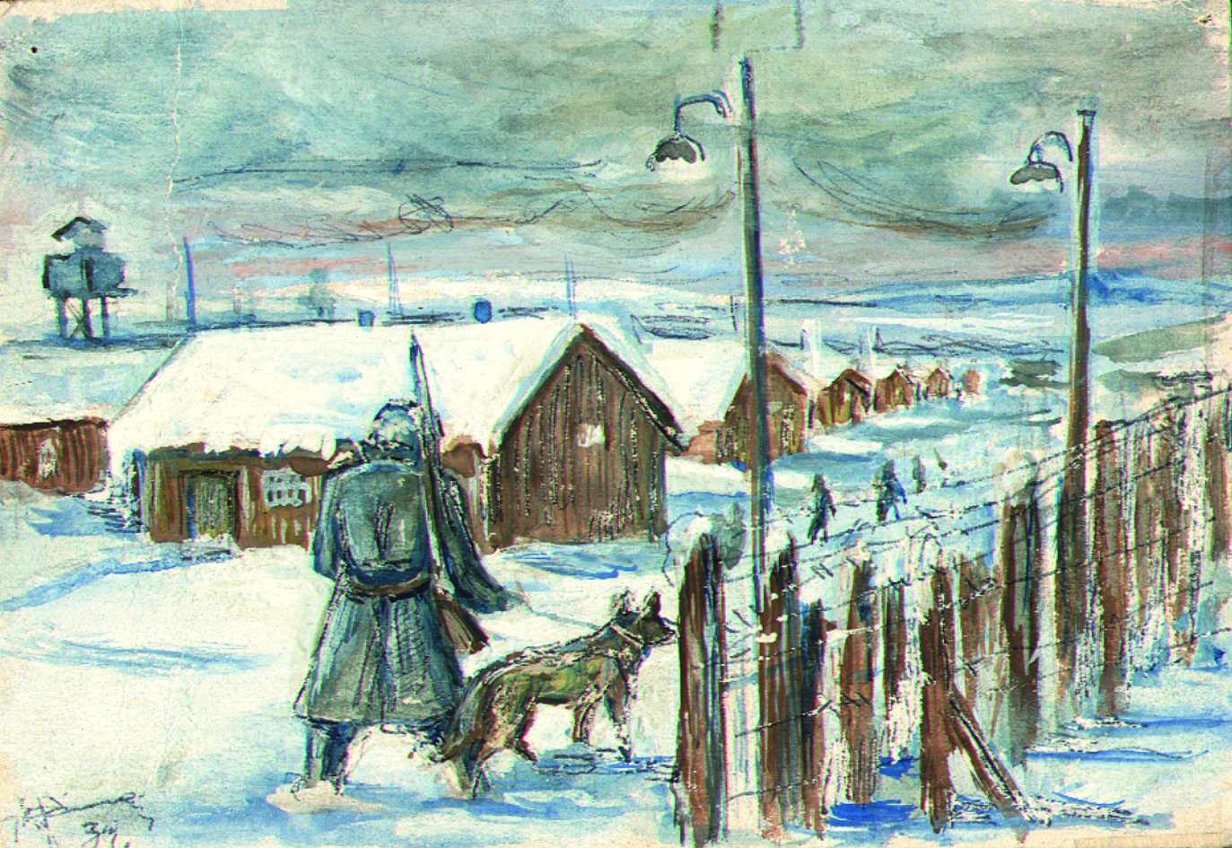 Stalag w Norymberdze zimą, gwasz